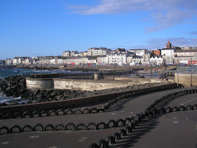 Панорамен изглед от Портстюарт